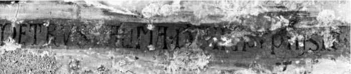 Pierpalma da Fermo, Madonna col Bambino, San Nicola da Tolentino e San Bernardino da Siena, particolare con la firma, Torre San Patrizio, Madonna delle Rose.